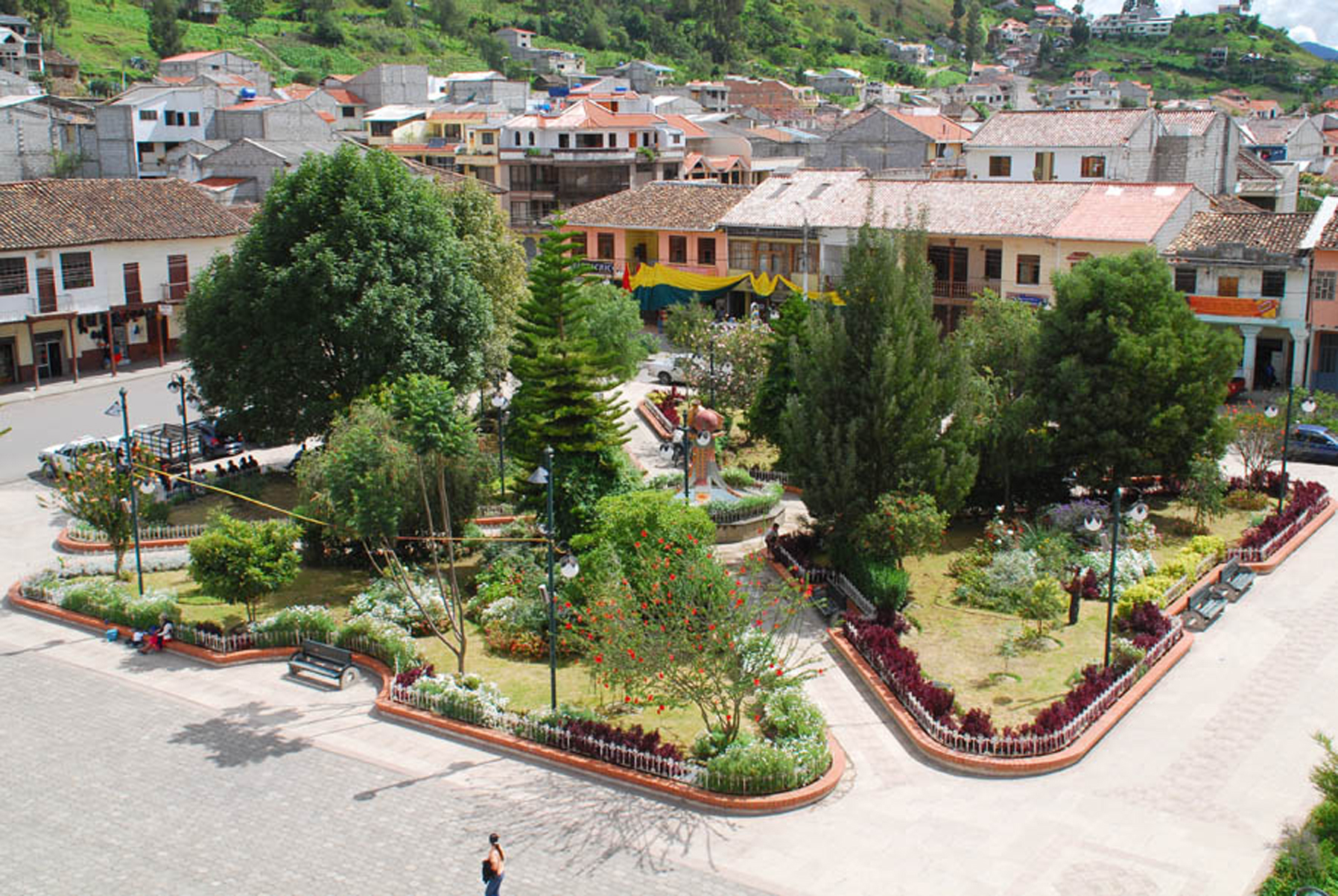 Chordeleg , prov de Azuay